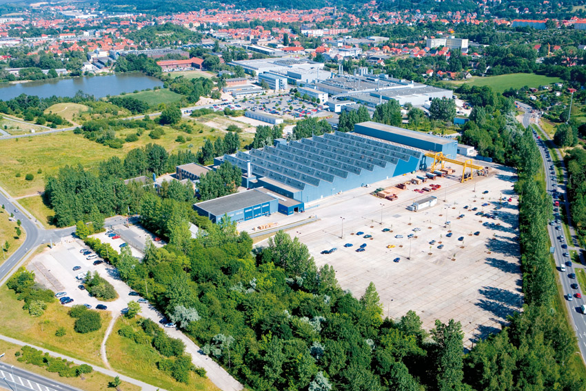 VEM motors GmbH, Wernigerode - Luftbild